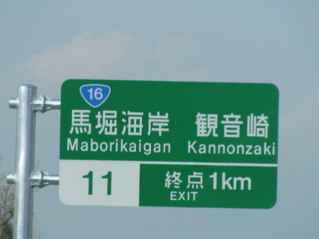 2009年3月20日、馬堀海岸IC付近で撮影